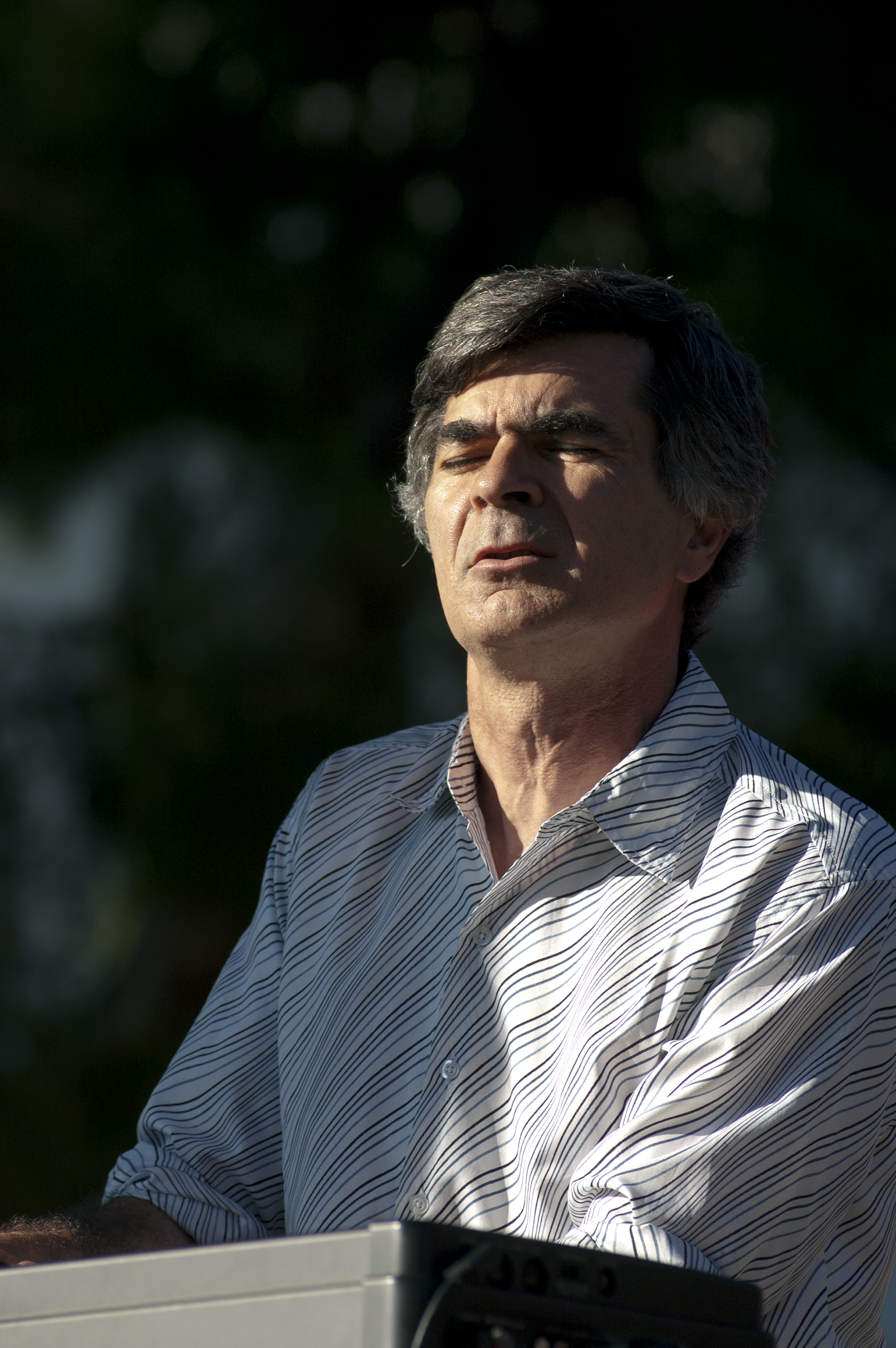 Portrait de Laurent Cugny, au piano au cours du concert du "Alain Brunet Quintet" organisé le 2005-07-19 dans le cadre du festival off à Juan-les-Pins (Alpes-Maritimes)